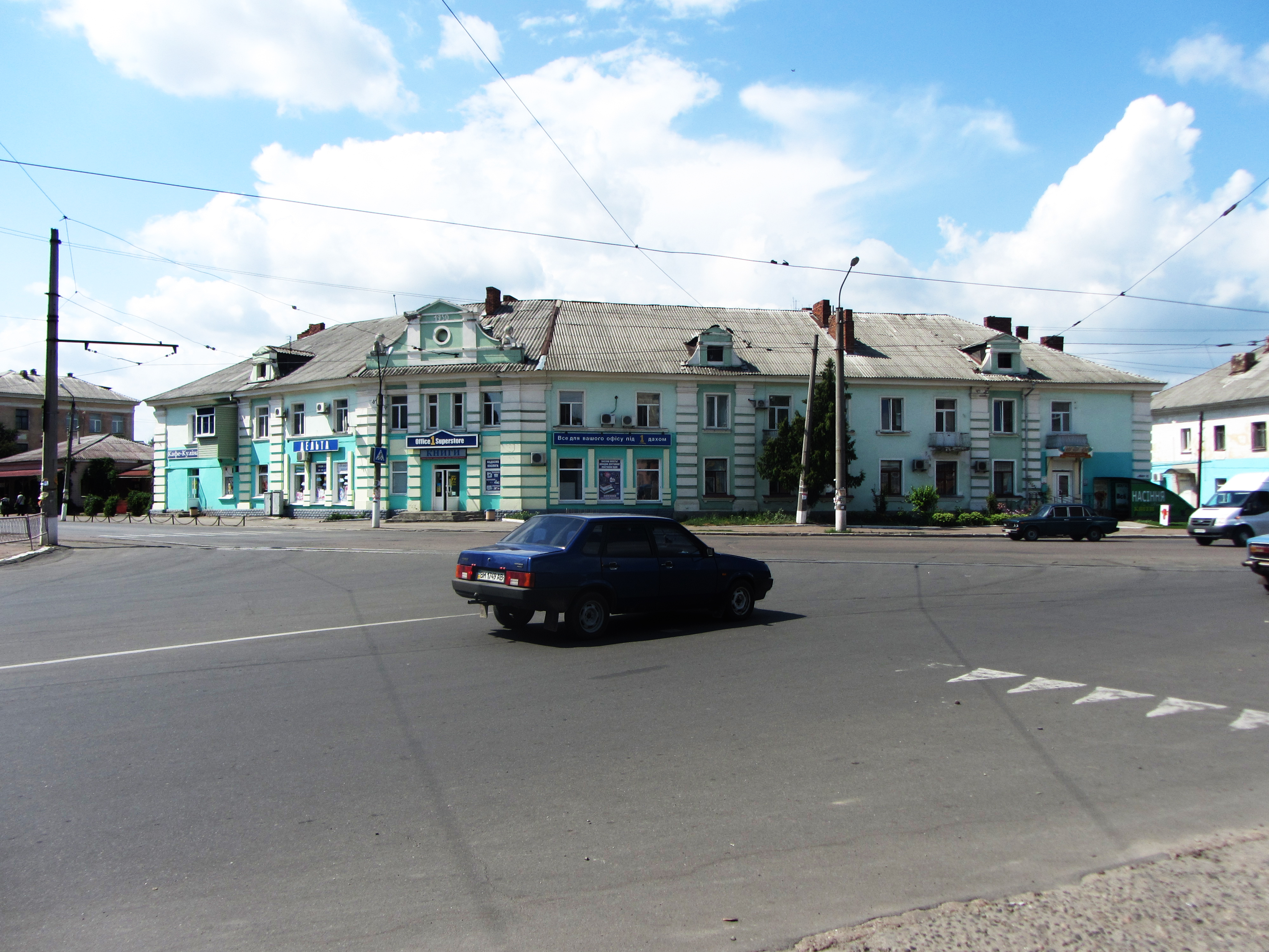 Житловий будинок, Конотоп, просп. Миру, 82